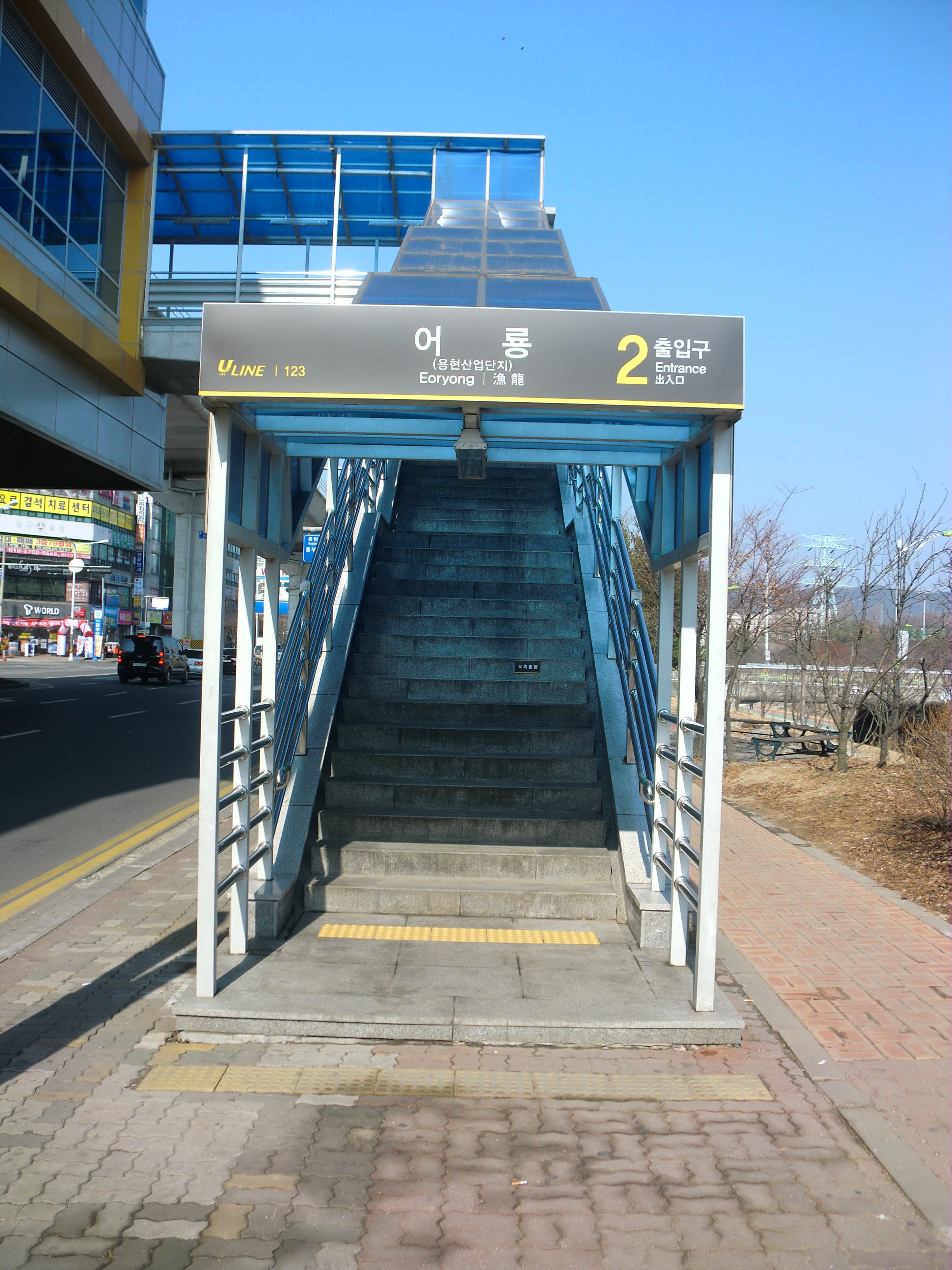 의정부 경전철 어룡역 2번 출구